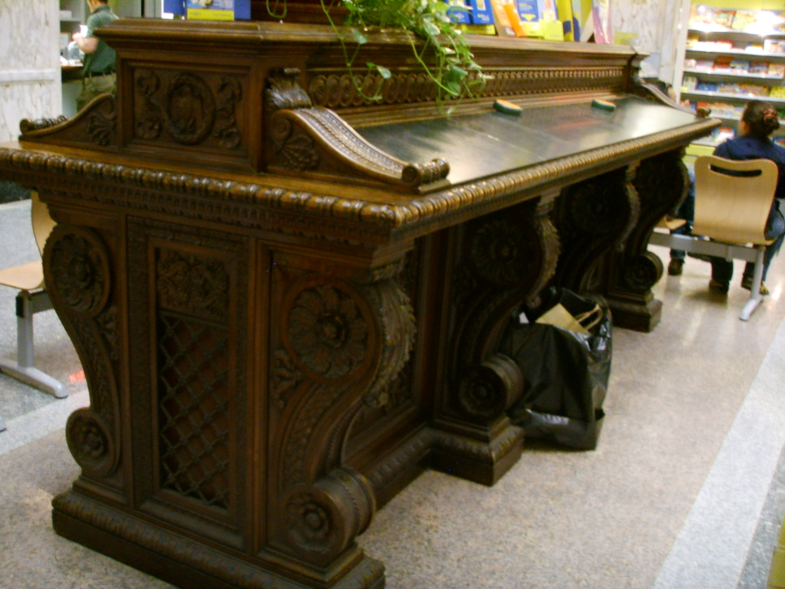 Palazzo delle poste (Firenze), hall, mobile